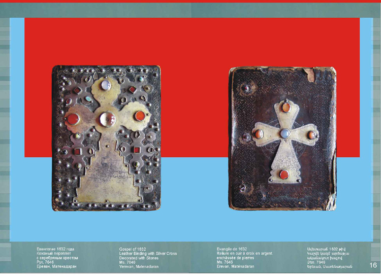 Առաքել Գեղամեցի